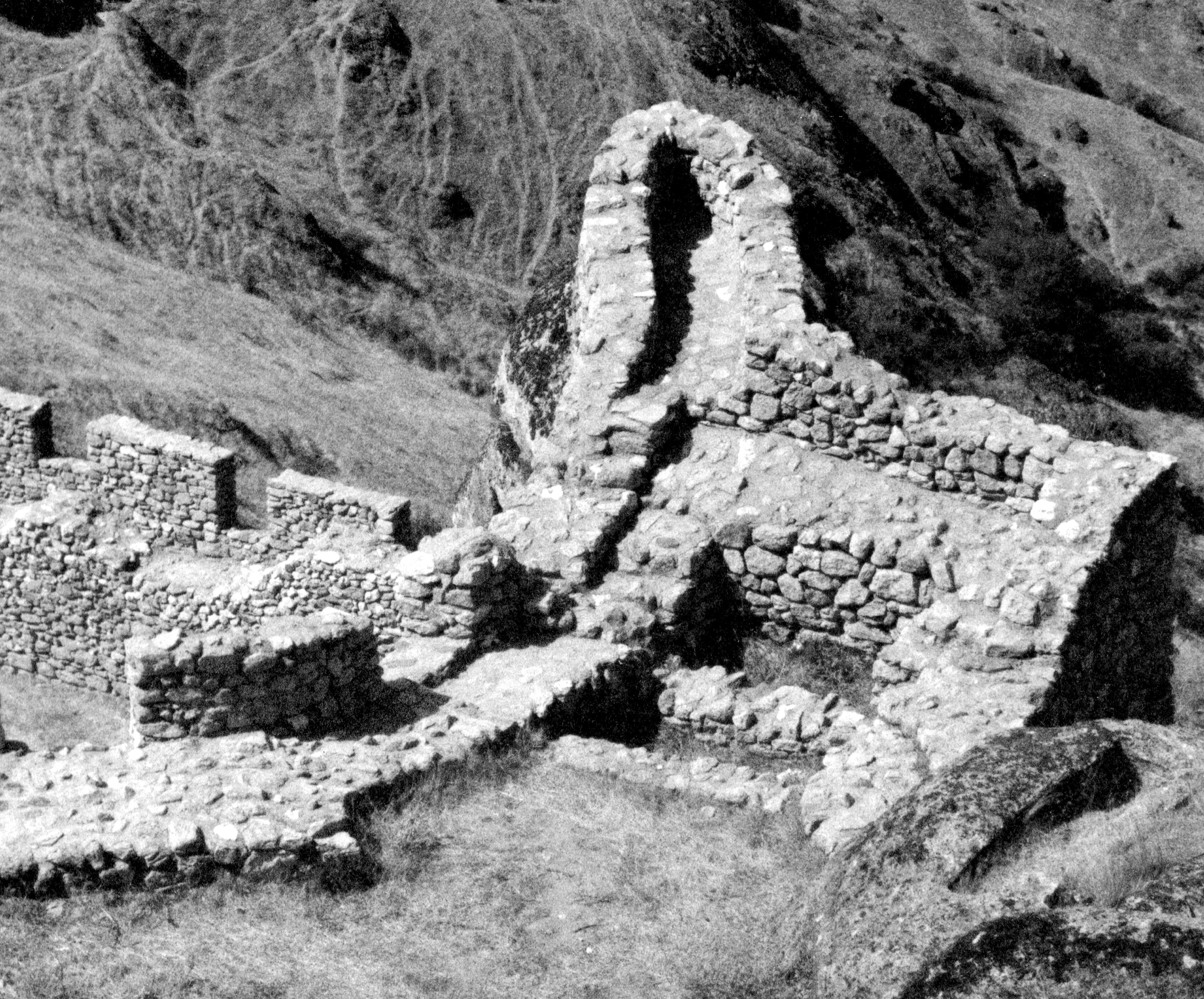 Fragment ruin twierdzy po pracach konserwatorskich